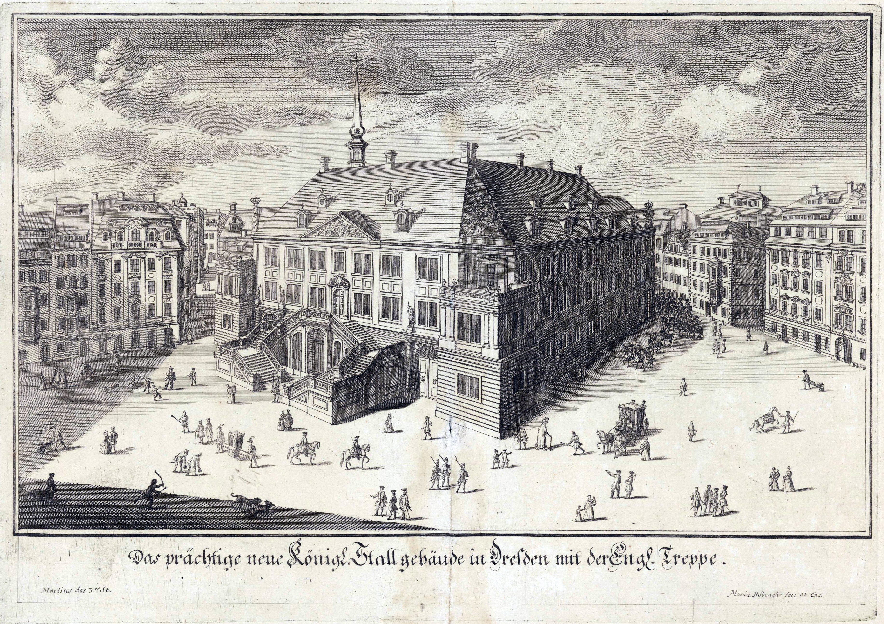 Ansicht des Johanneums in Dresden, Kupferstich, ca. 1744. Das prächtige neue Königl. Stallgebäude in Dresden mit der Engl. Treppe einfarbiger Kupferstich, 40 x 25 cm